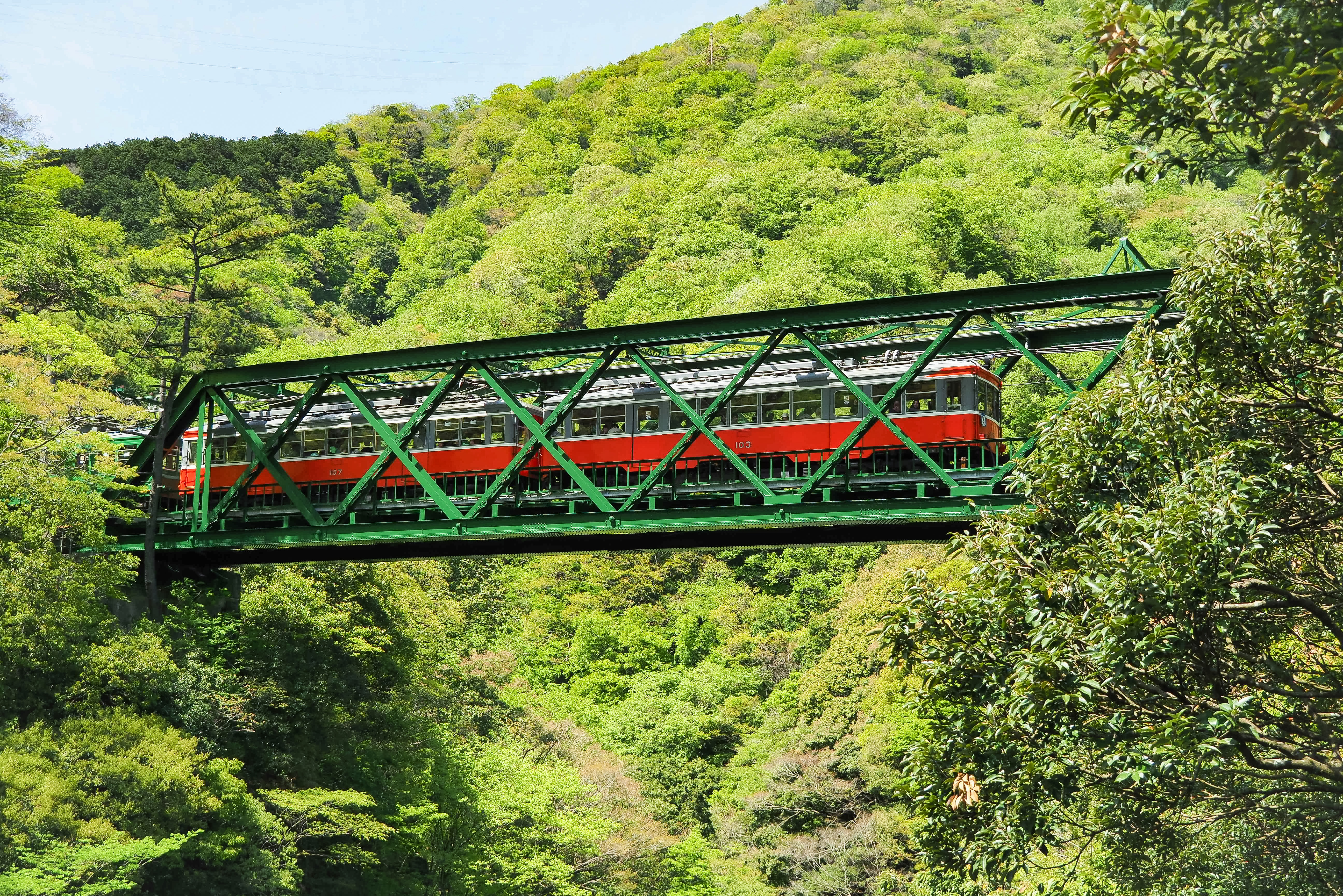 箱根登山鉄道の開業当時から残る早川橋梁を渡る、モハ1形103+107+モハ2形109。